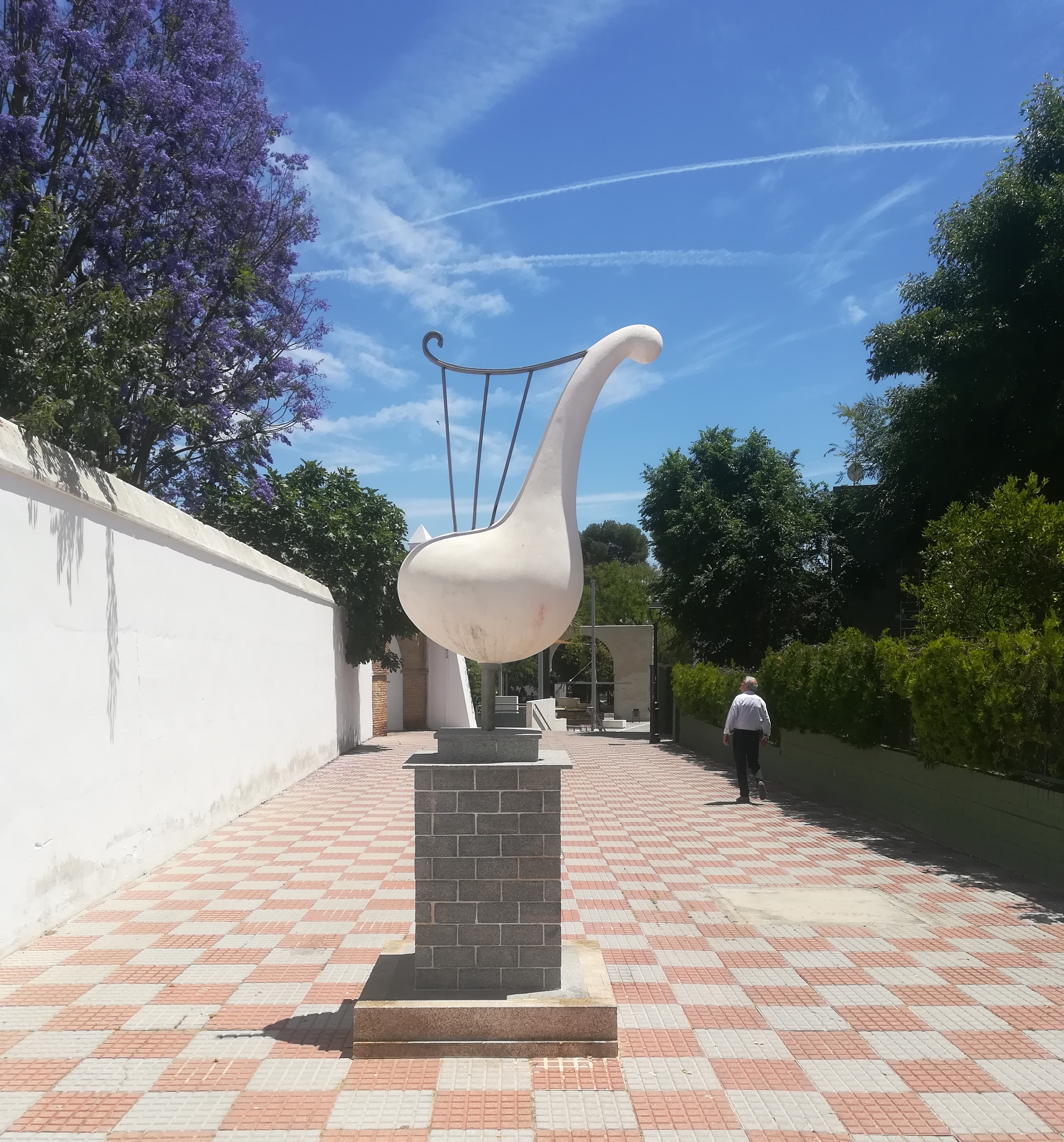 Memorial a los Fallecidos en Accidentes de Tráfico. Tomares, provincia de Sevilla, Andalucía, España.